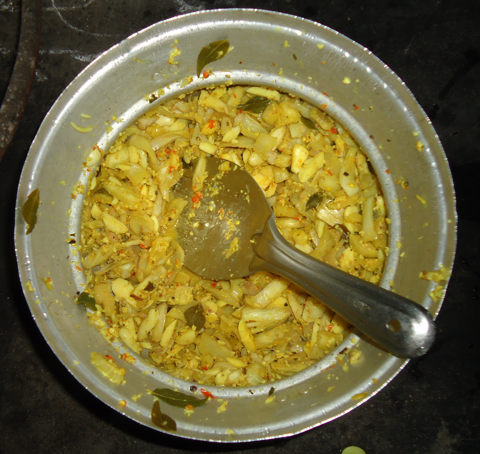 ചക്കപ്പുഴുക്ക്